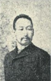 秋月左都夫 オーストロハンガリー公使時代